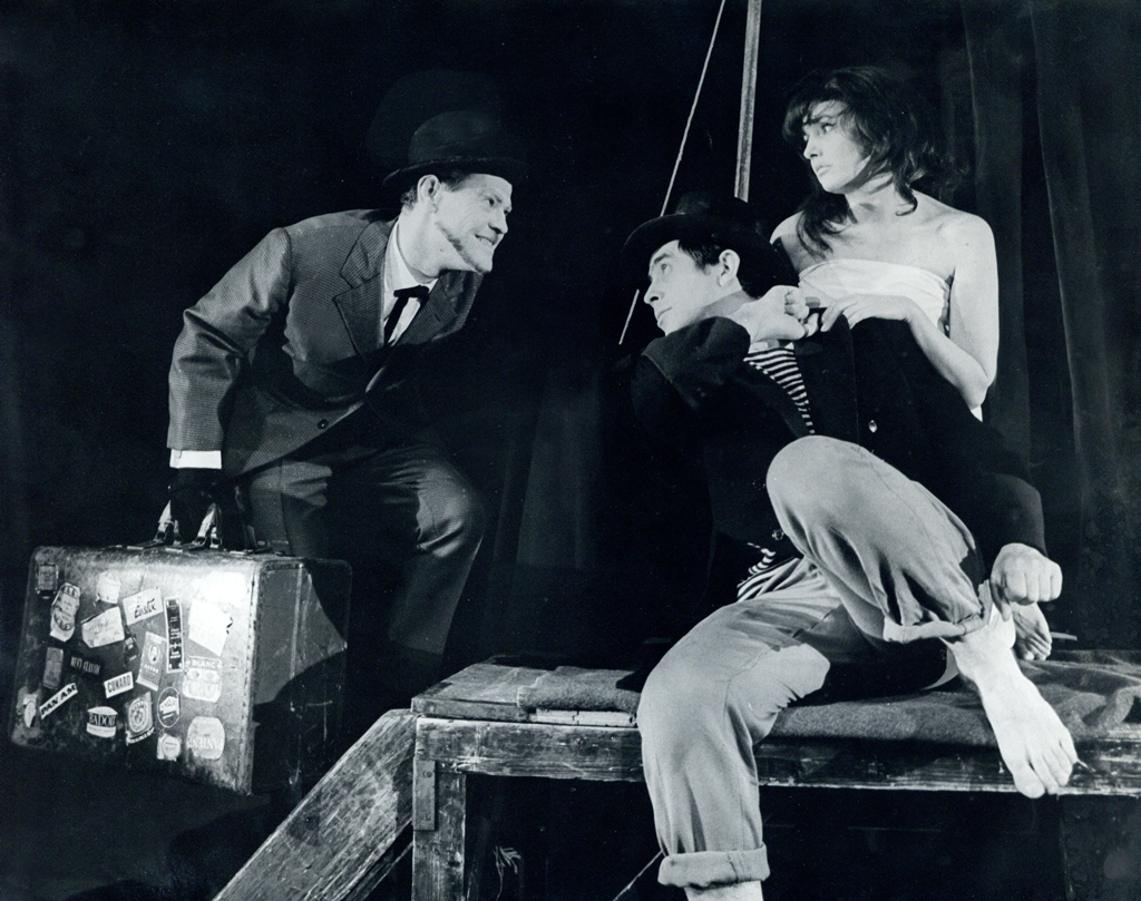 Ivan Cankar, Pohujšanje v dolini šentflorjanski, Drama SNG v Ljubljani. Na fotografiji: Lojze Rozman (Zlodej), Polde Bibič (Krištof Kobar - Peter), Majda Potokar (Jacinta).